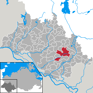 Ludwigslust in Mecklenburg-Vorpommern - district Ludwigslust